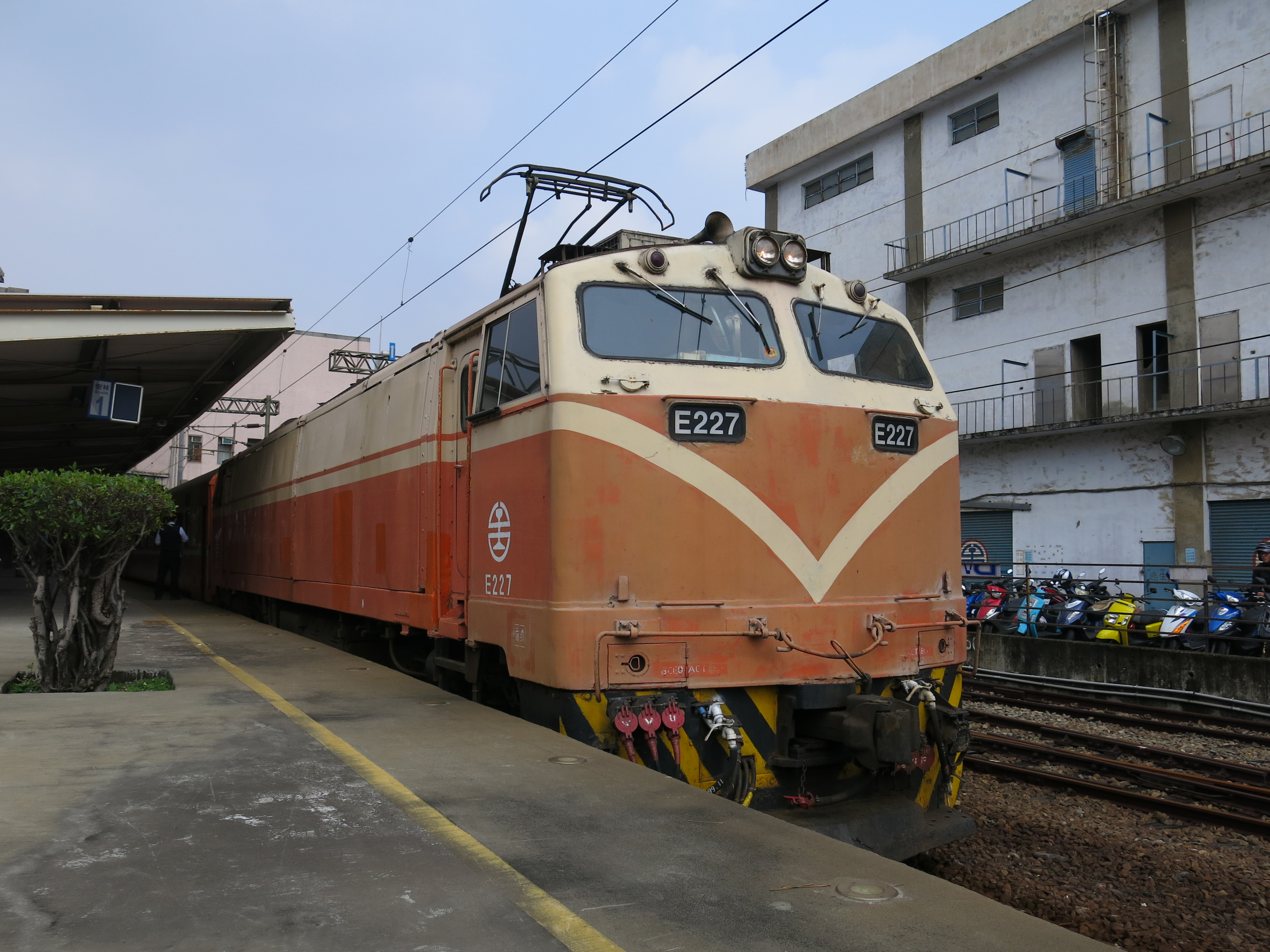 中文（台灣）: 臺灣鐵路管理局電力機車E227停靠樹林車站月台。